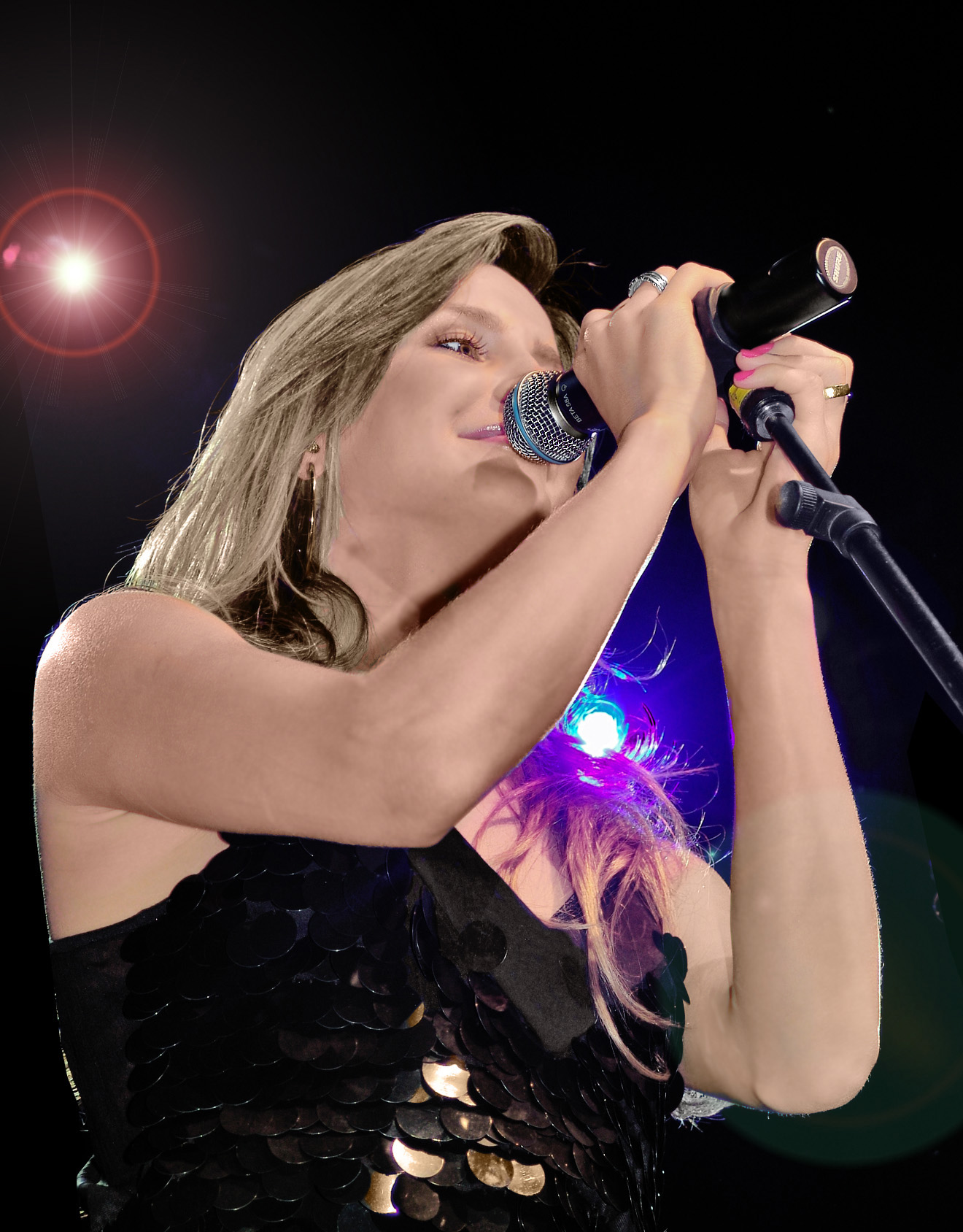 Cláudia LeitteClaudia Leitte - Singer